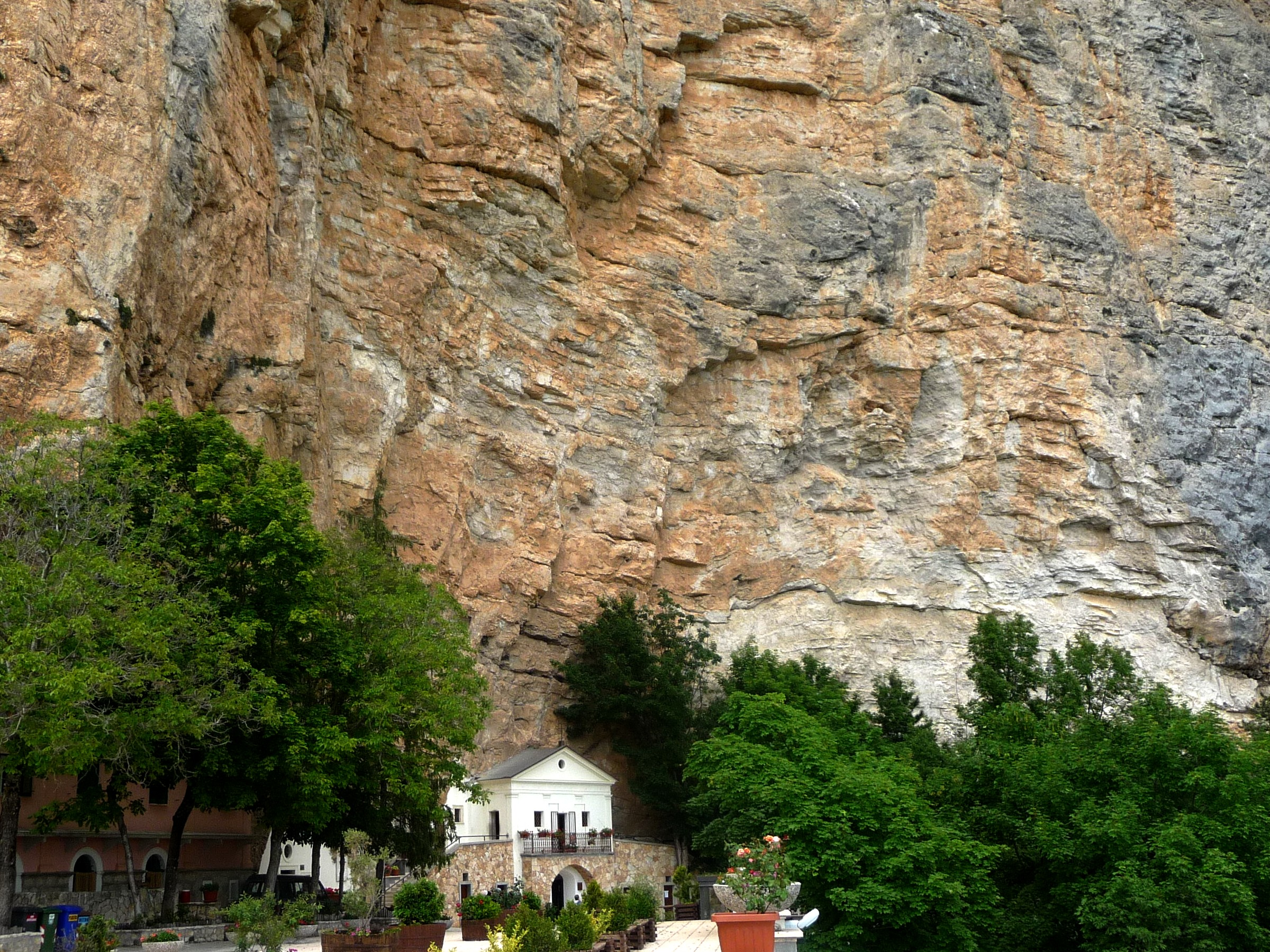 Santuario sovrastato dal Monte Autore